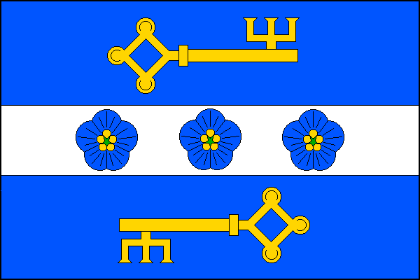 vlajka, Truskovice, okres Strakonice